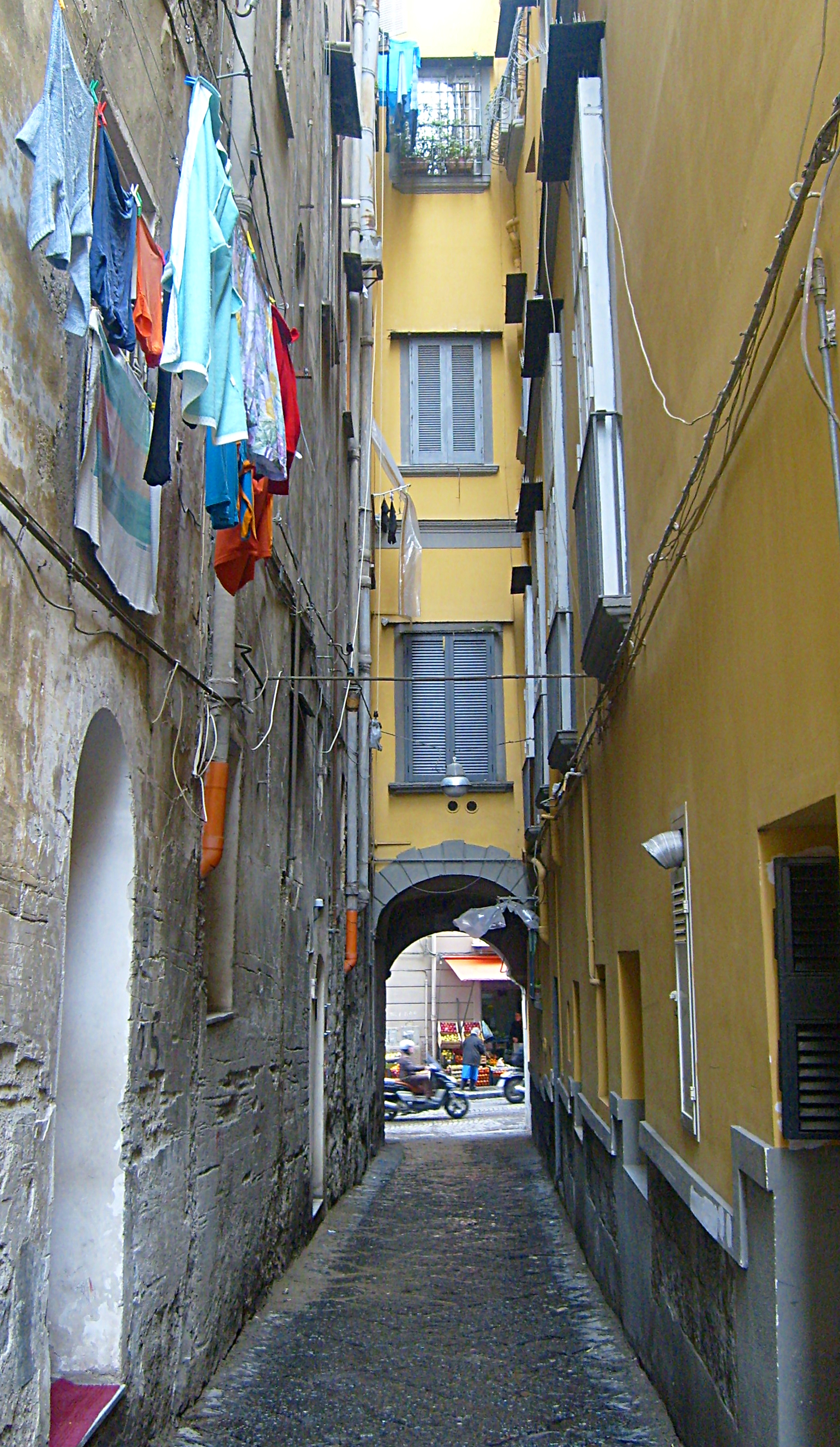 Vicolo caratteristico del centro storico di Napoli.